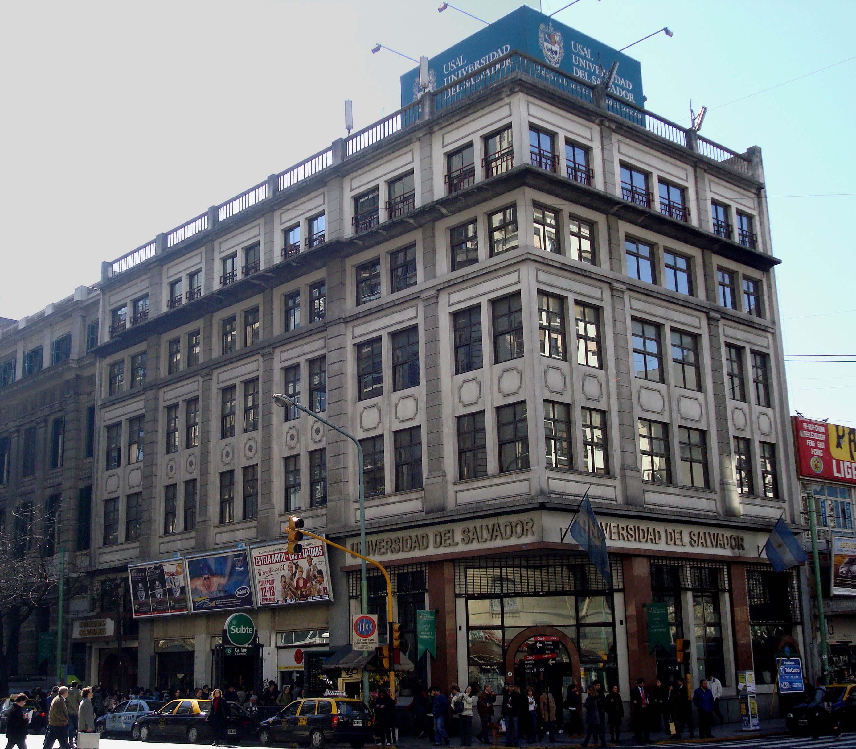 Departamento de Ingreso